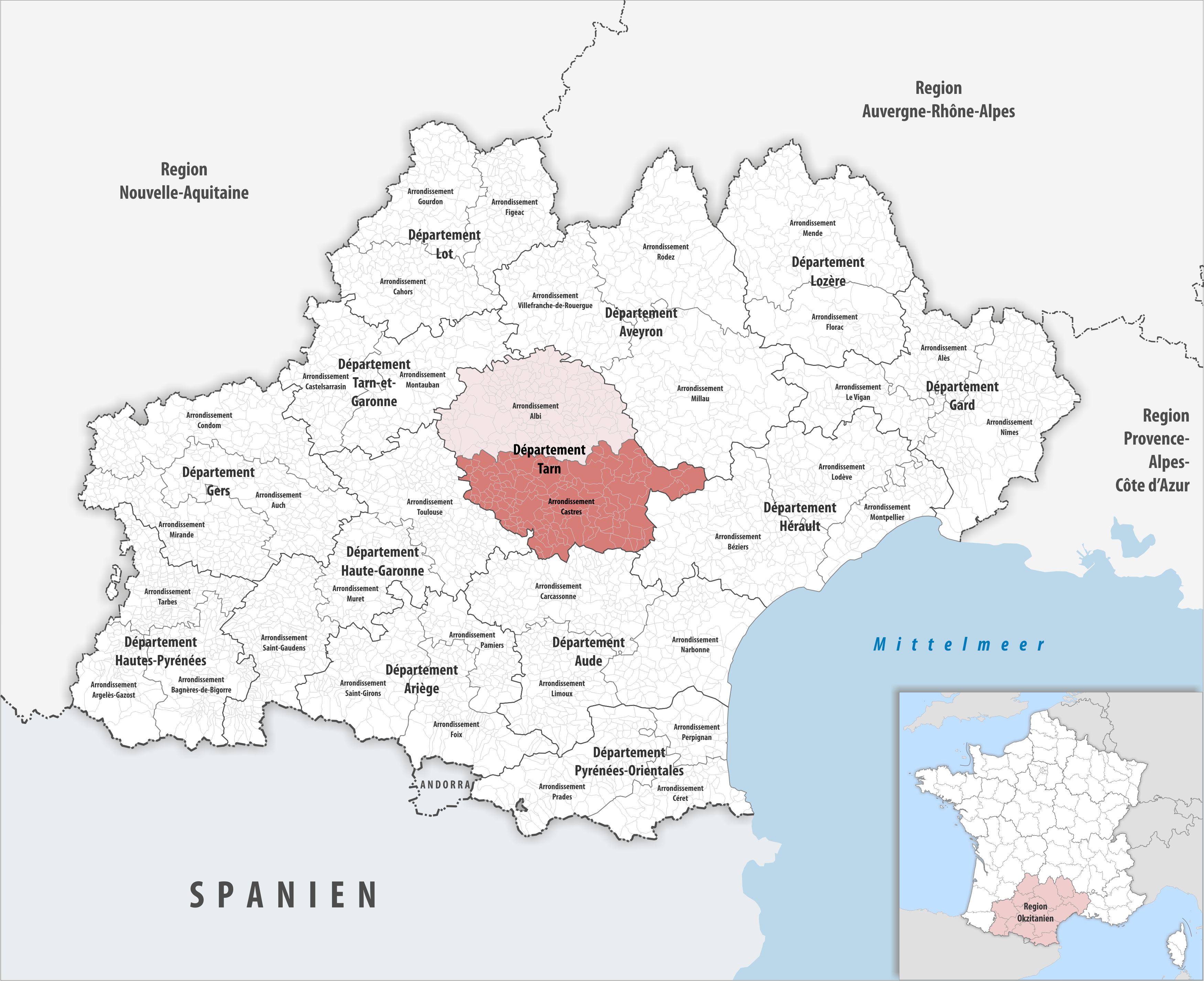 Lage des Arrondissements Castres